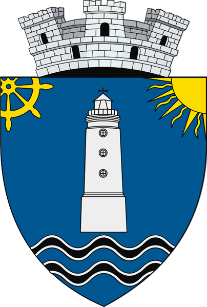 Coat of arms of Sulina, Romania Descrierea stemei: Stema oraşului Sulina se compune dintr-un scut triunghiular cu marginile rotunjite. În câmp de azur se află un far de argint, însoţit în dreapta de o timonă şi în stânga de un soare, de aur. În vârful scutului sunt amplasate două fascii undate, negre, cu marginile de argint. Scutul este trimbrat de o coroană murală de argint, cu trei turnuri crenelate. Semnificaţia elementelor însumate: Farul este simbolul oraşului Sulina, axat pe activitatea maritimă patronată de Comisia Europeană a Dunării. Timona simbolizează activitatea portuară din zonă, iar soarele face trimitere la poziţia oraşului, care este cea mai estică localitate din România. Fasciile undate reprezintă braţul Sulina, unul dintre braţele navigabile ale fluviului Dunărea. Coroana murală cu trei turnuri crenelate semnifică faptul că localitatea are rangul de oraş.